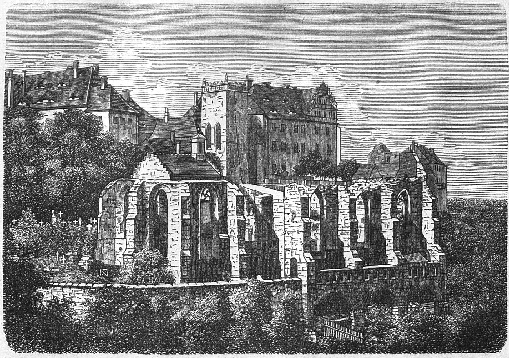 Hornjoserbsce: Budyski hród a Mikławšk.